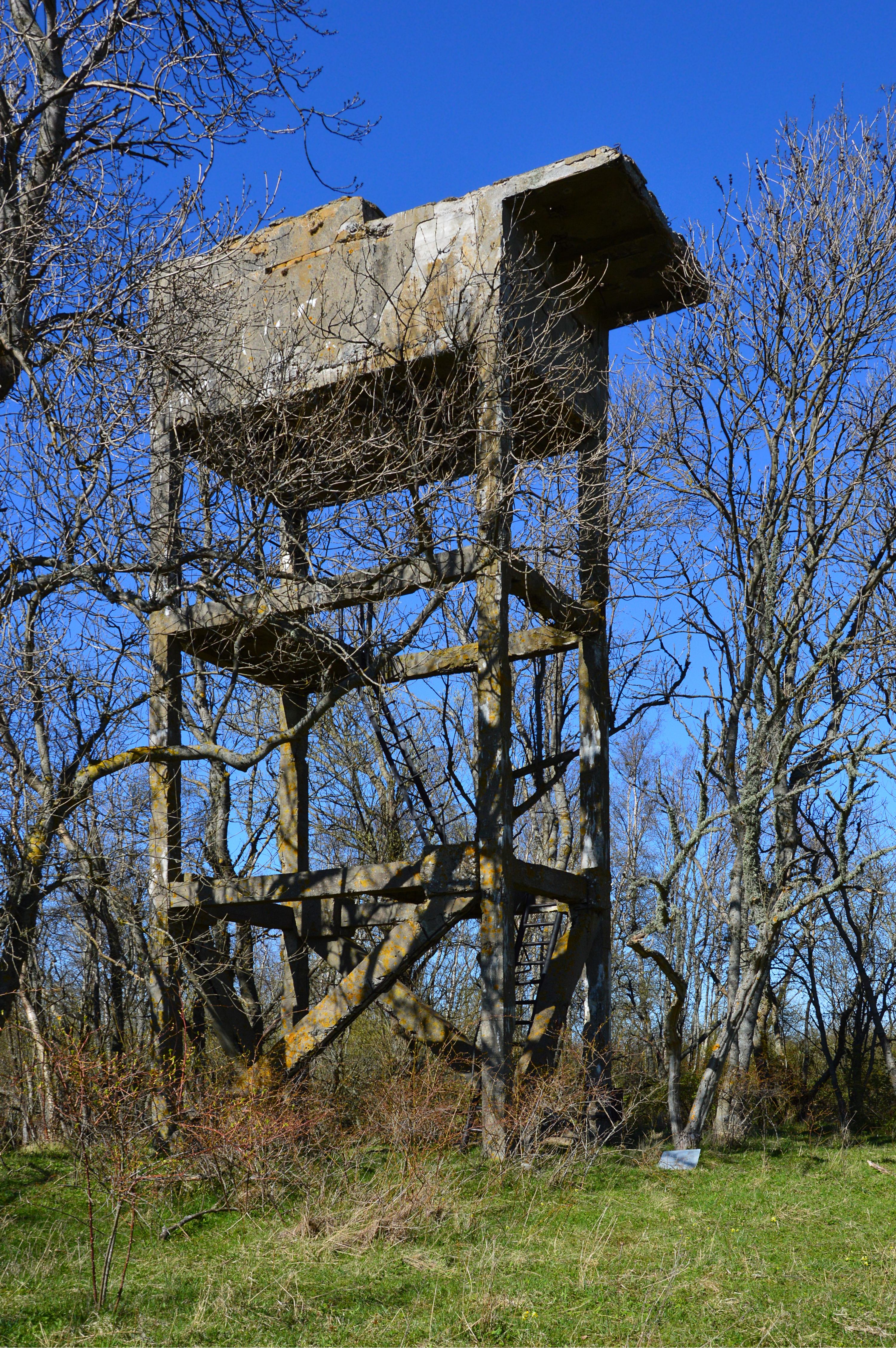 Osmussaare vaatetorn